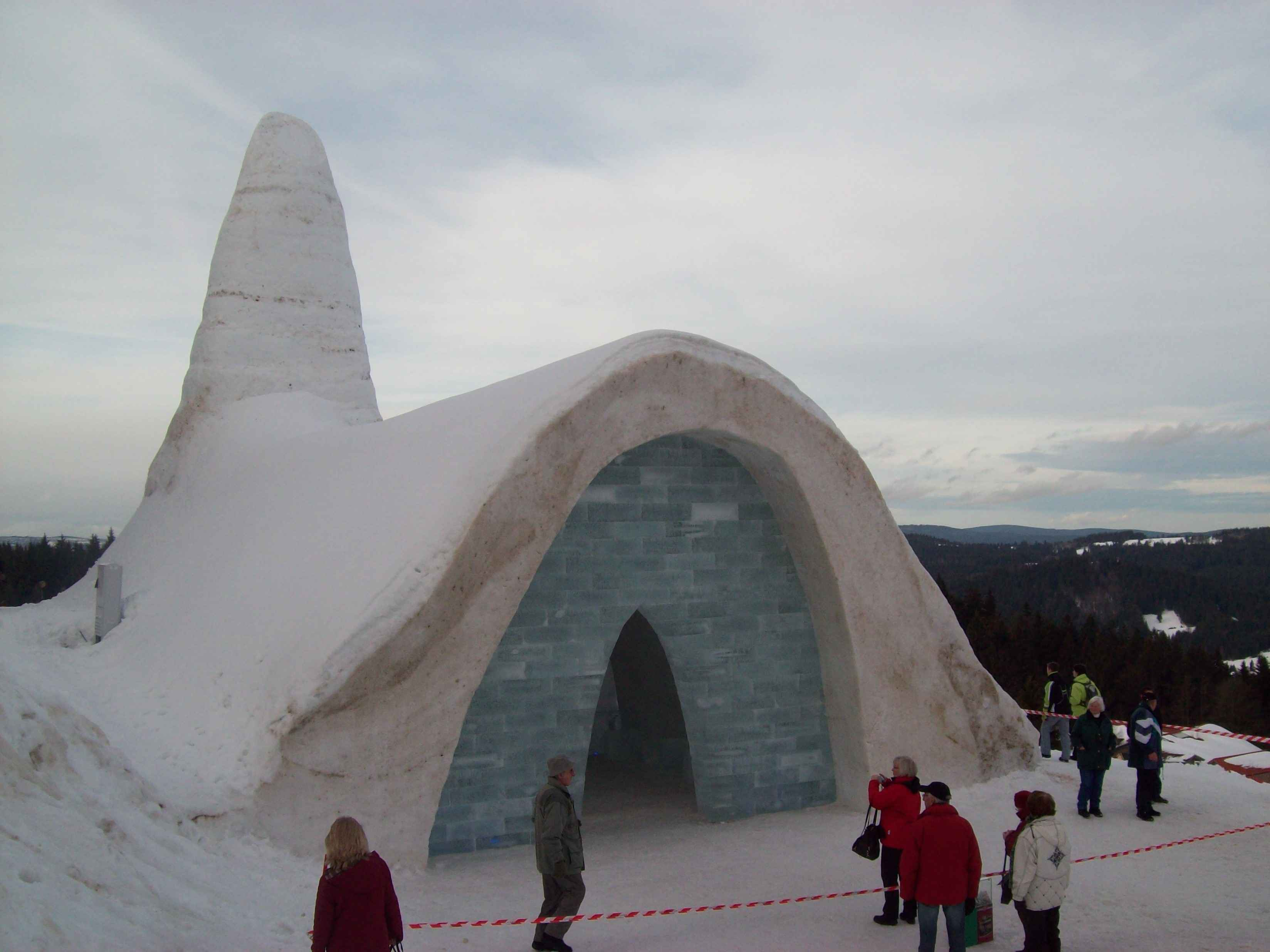 00 Jahre Schneekirche Mitterfirmiansreut